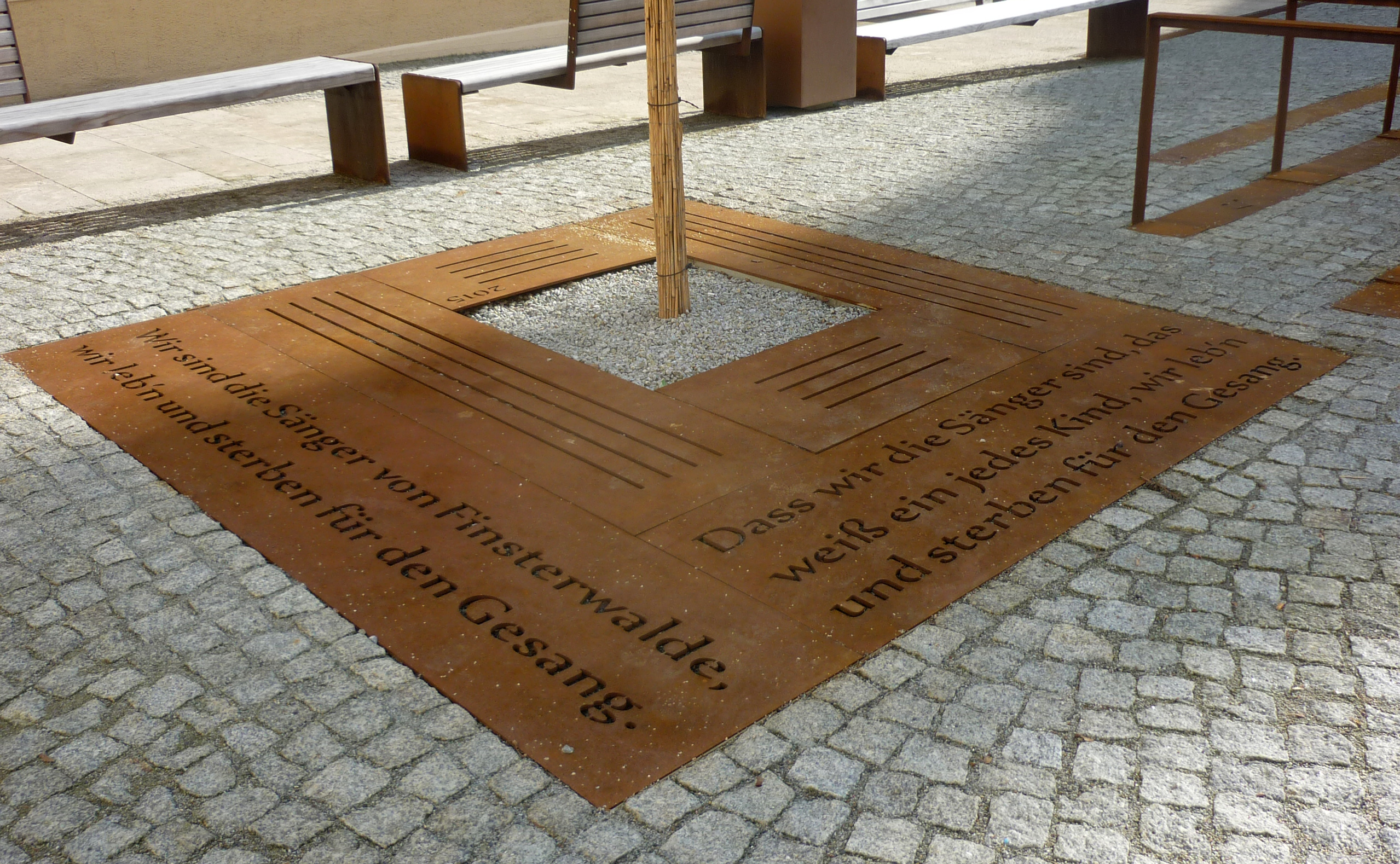 Sängerdenkmal (Platte) in Finsterwalde im Hof des Vorderschlosses